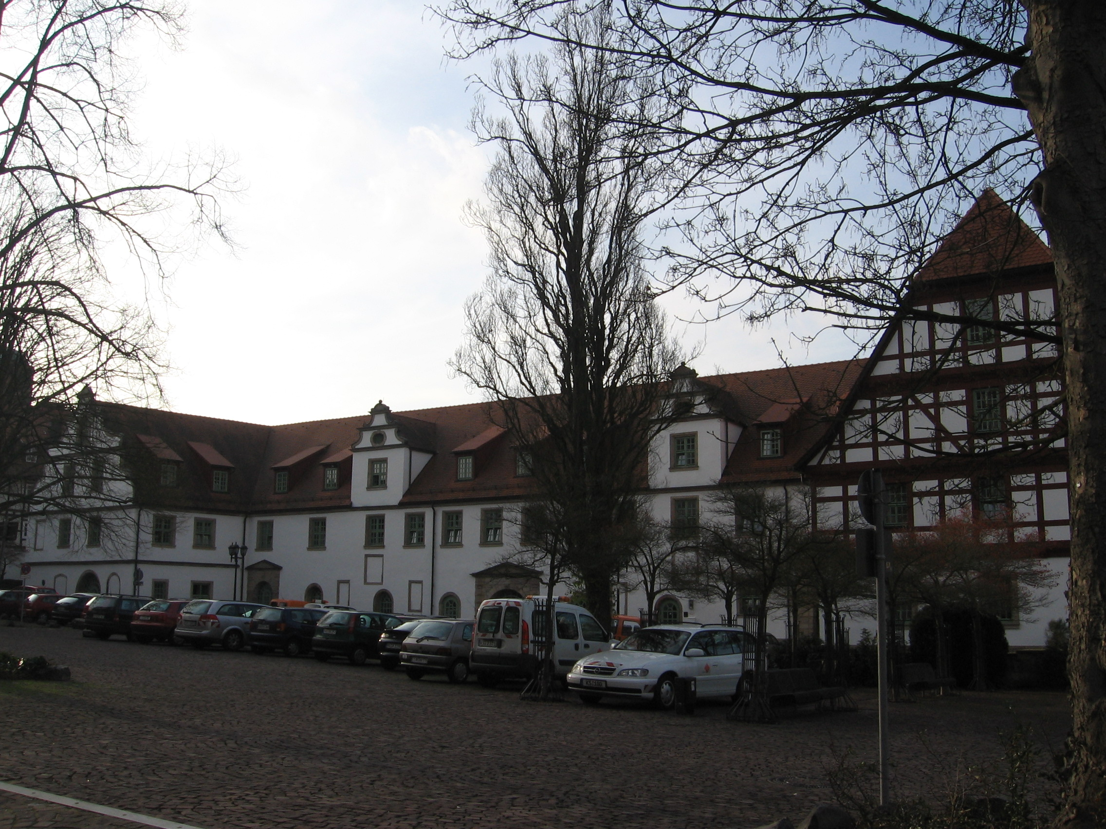 Marstall in Rotenburg, Fulda (erbaut 1570)